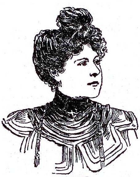 Portrait de Clotilde Ozouf Reine des Reines de Paris 1900